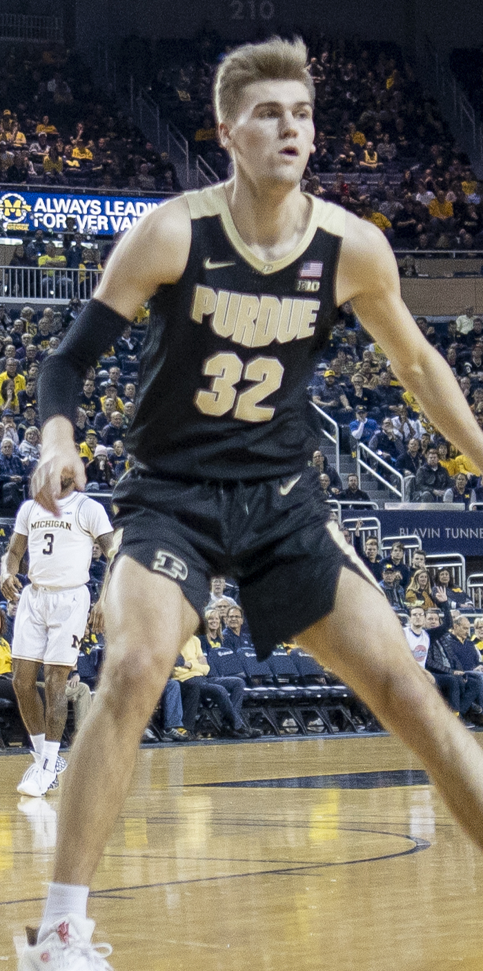 8V6A8538